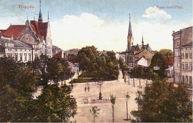 Troppau (Opava), Franz Josef Platz, about 1900, Austrian Empire era